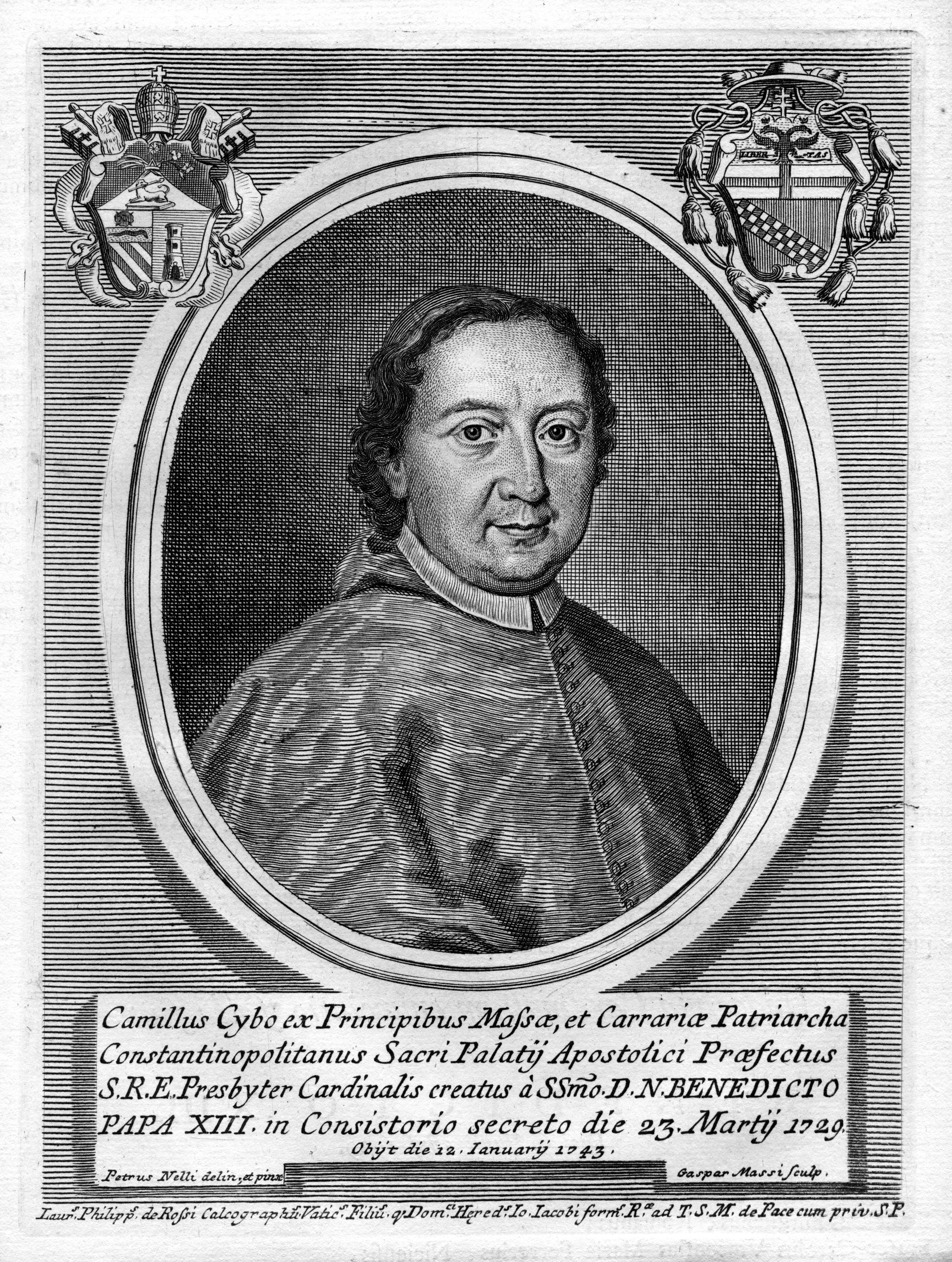 Portrait de Camillo Cibo (1681-1743)